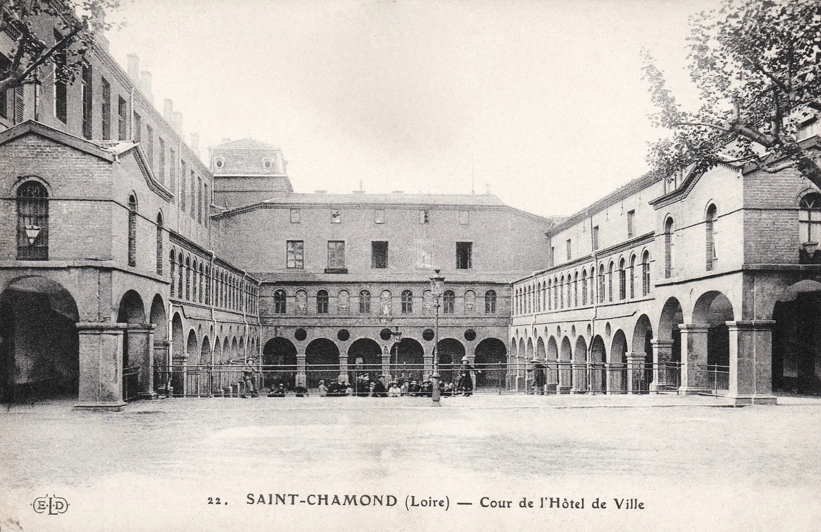 Saint-Chamond, ancien cloître du couvent des Minimes : Hôtel de Ville (à gauche) et école (à droite) ; au milieu, la cour de récréation.